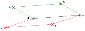 Relation d'équipollence entre bipoints, définissant un vecteur en géométrie euclidienne.